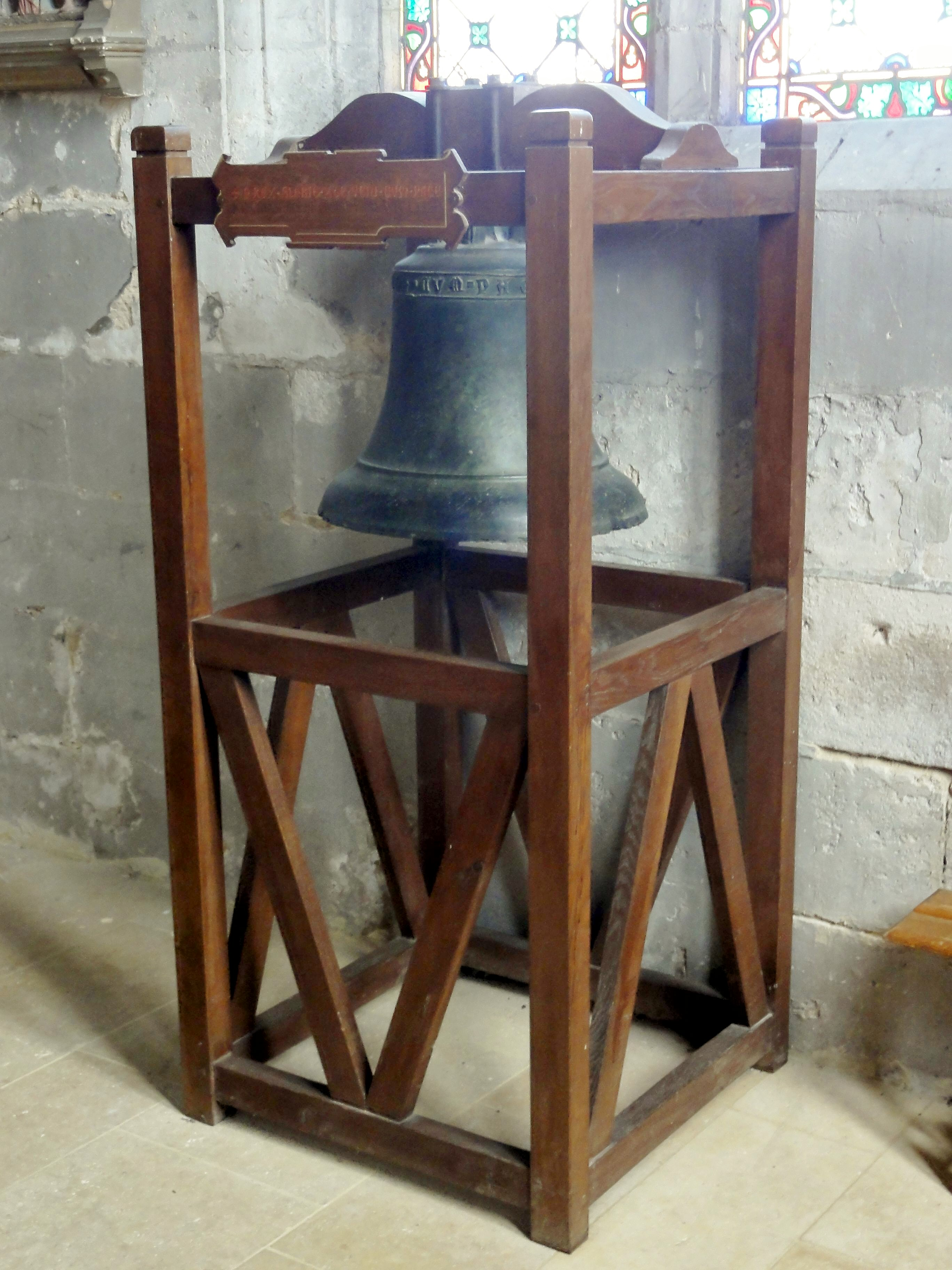 Cloche du XIIe ou XIIIe siècle, l'une des plus vieilles de France.